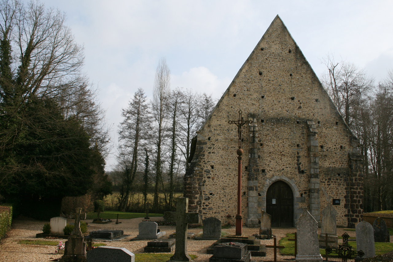 l'ancienne église Saint-Pierre de Réveillon et son cimetière à La Ferté-Vidame, Eure-et-Loir, France.